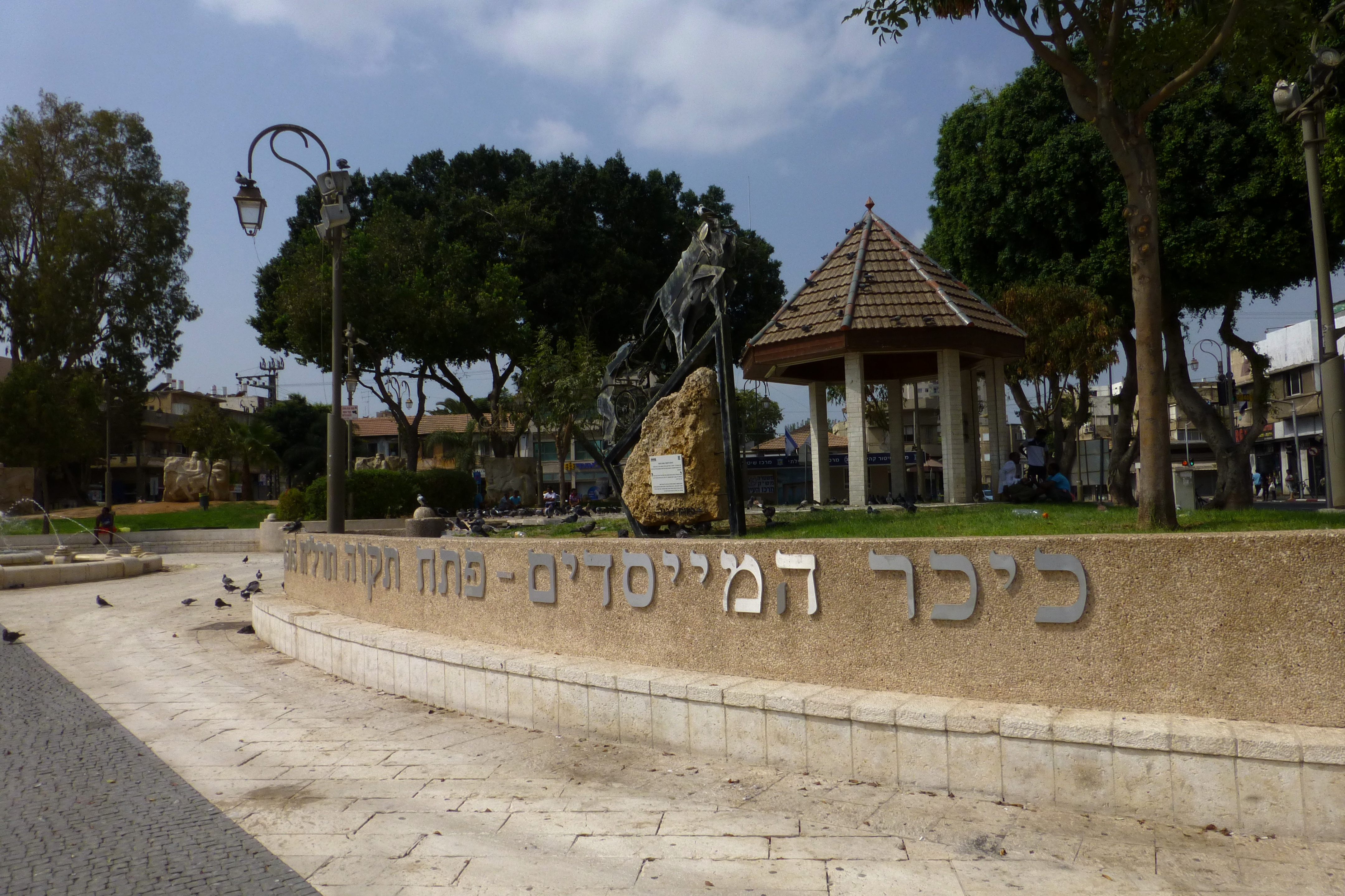 כיכר המייסדים, כיכר מרכזית בפתח תקווה, שוכנת במיקום הבתים הראשונים שנבנו בפתח תקווה בשנת 1878. כבר בימי העלייה השנייה שימשה כמקום מפגש ובילויים.